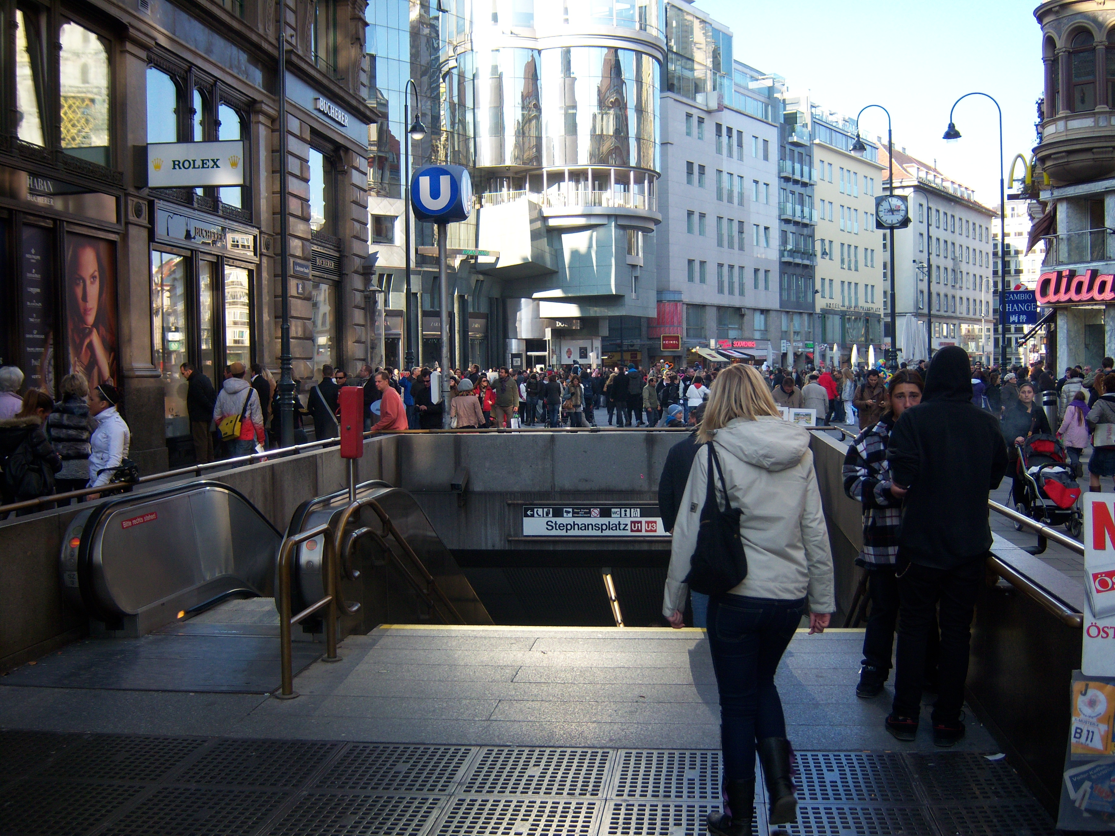 Zugang zur U-Bahn-Station Stephansplatz